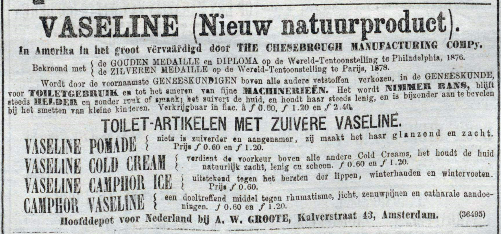 Een van de eerste Nederlandse advertenties voor het product Vaseline van The Chesebrough Manufacturing Compy